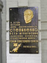 Степаненко Пётр Игнатьевич 15.5.18 Майкоп